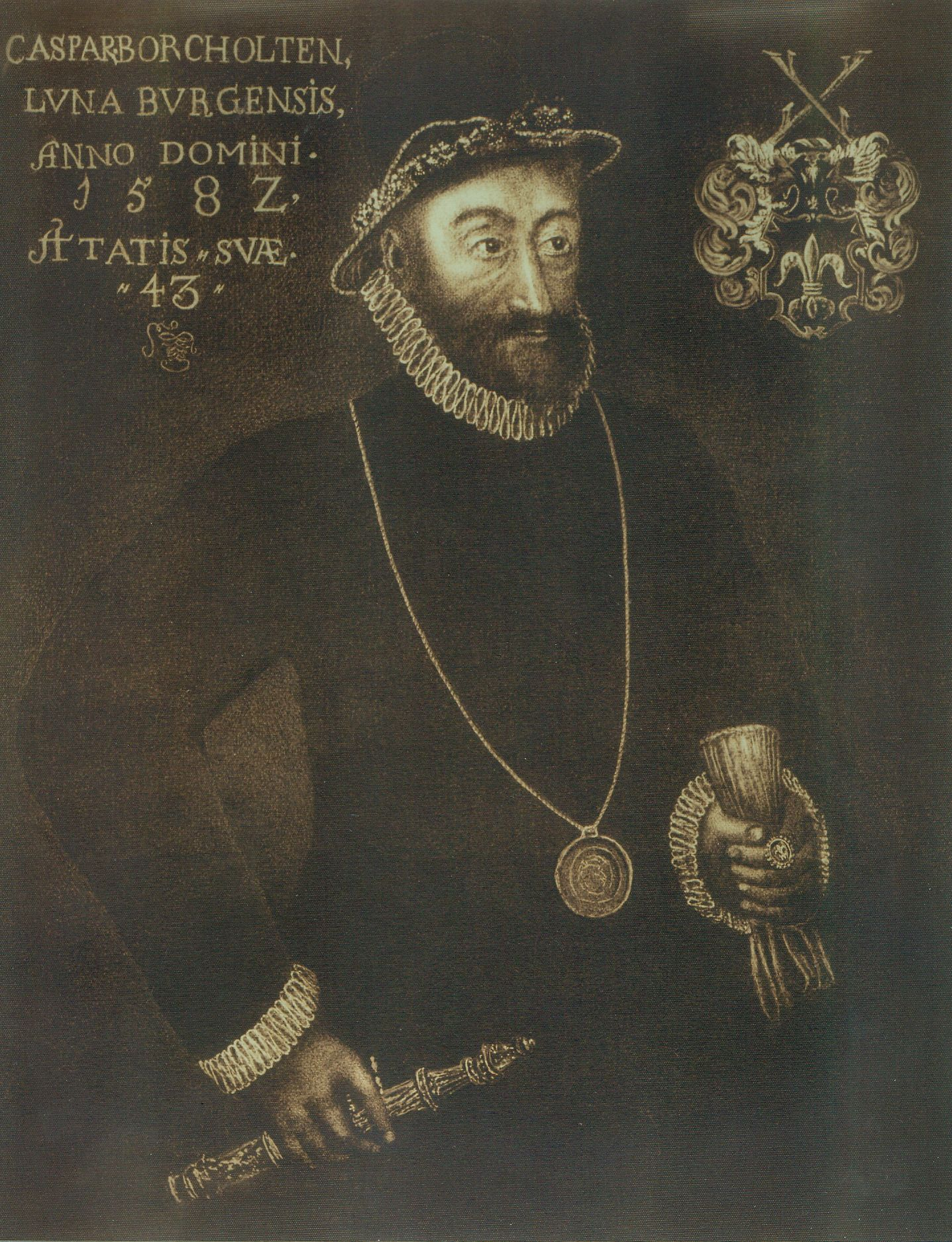 Caspar Borcholten, Caspar Borcholt